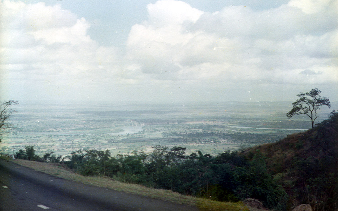 Elefantenmarsch bei Chikwawa